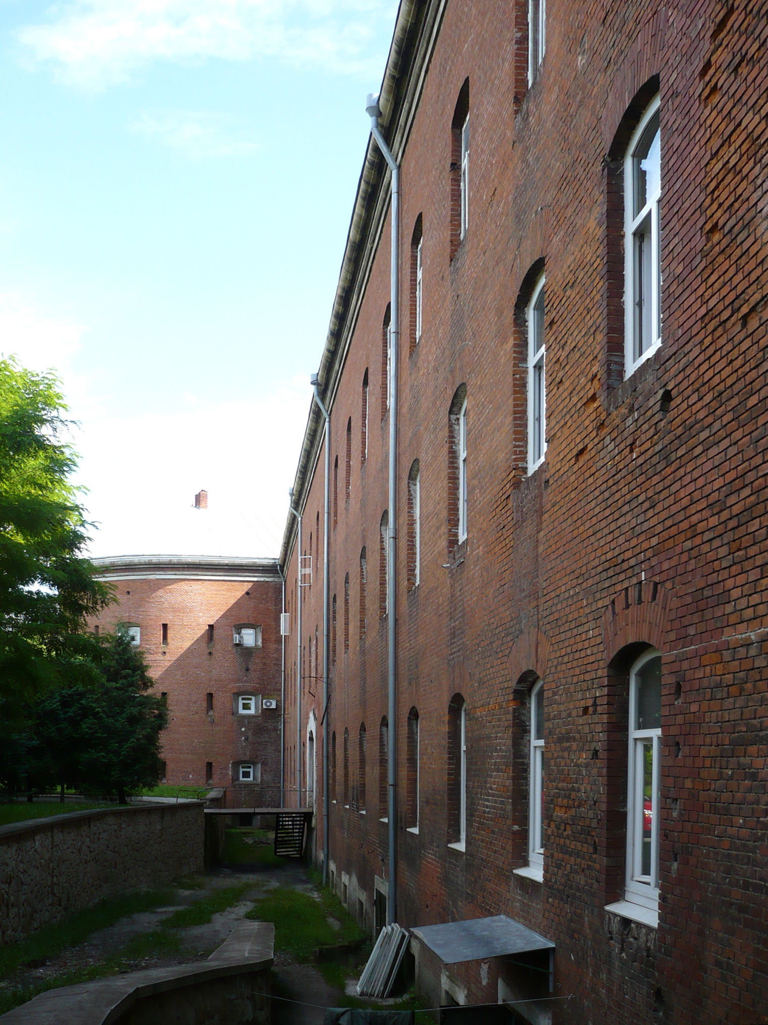 Lwów - cytadela